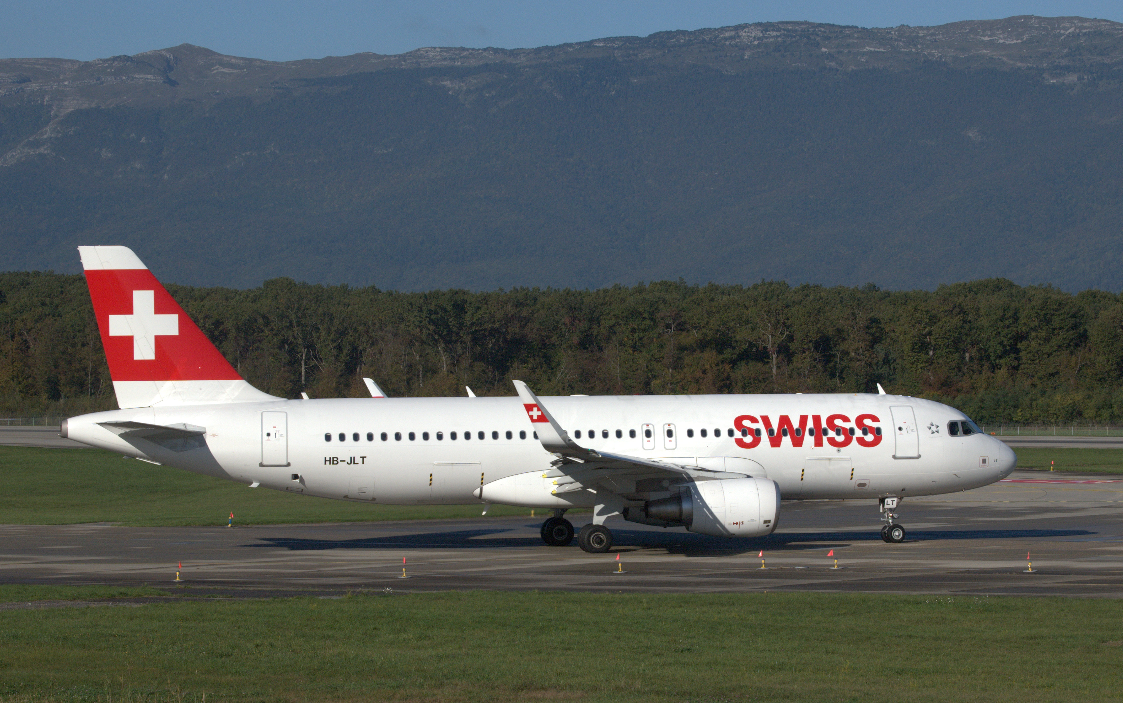 GVA 17.10.2013